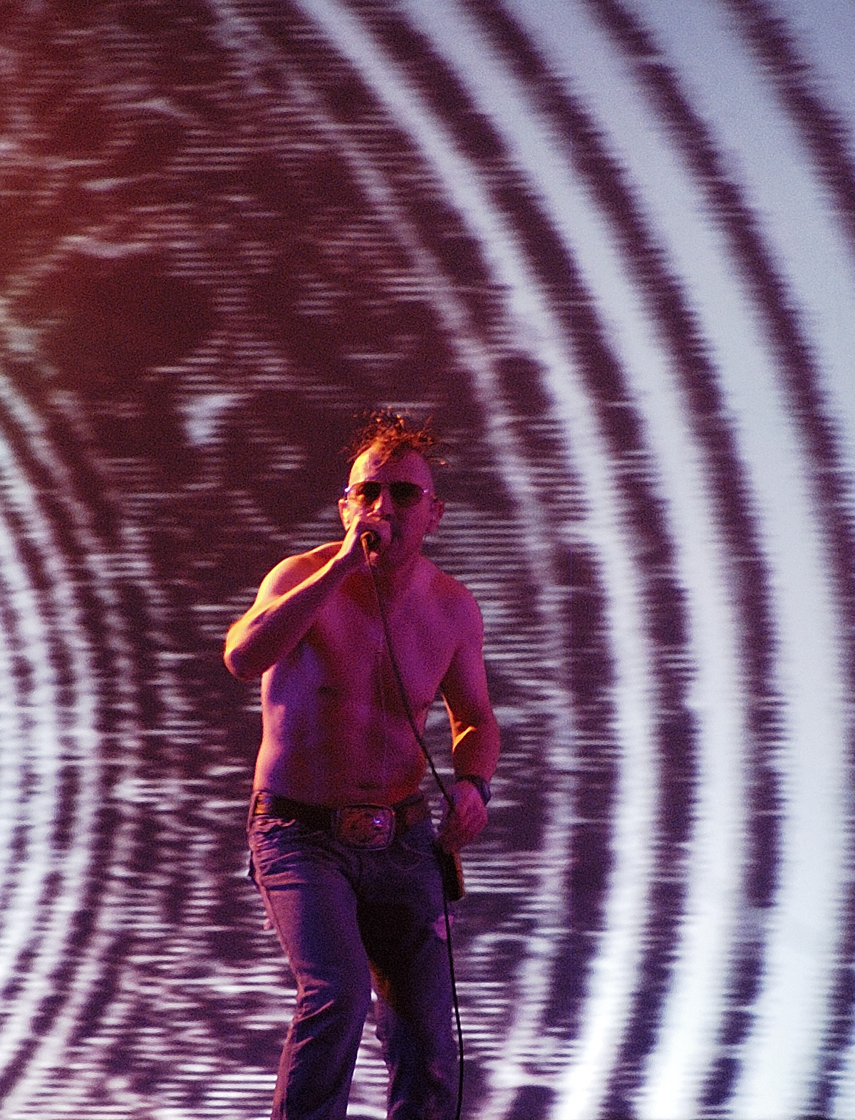 Maynard James, Tool singer, in Roskilde Festival 2006.